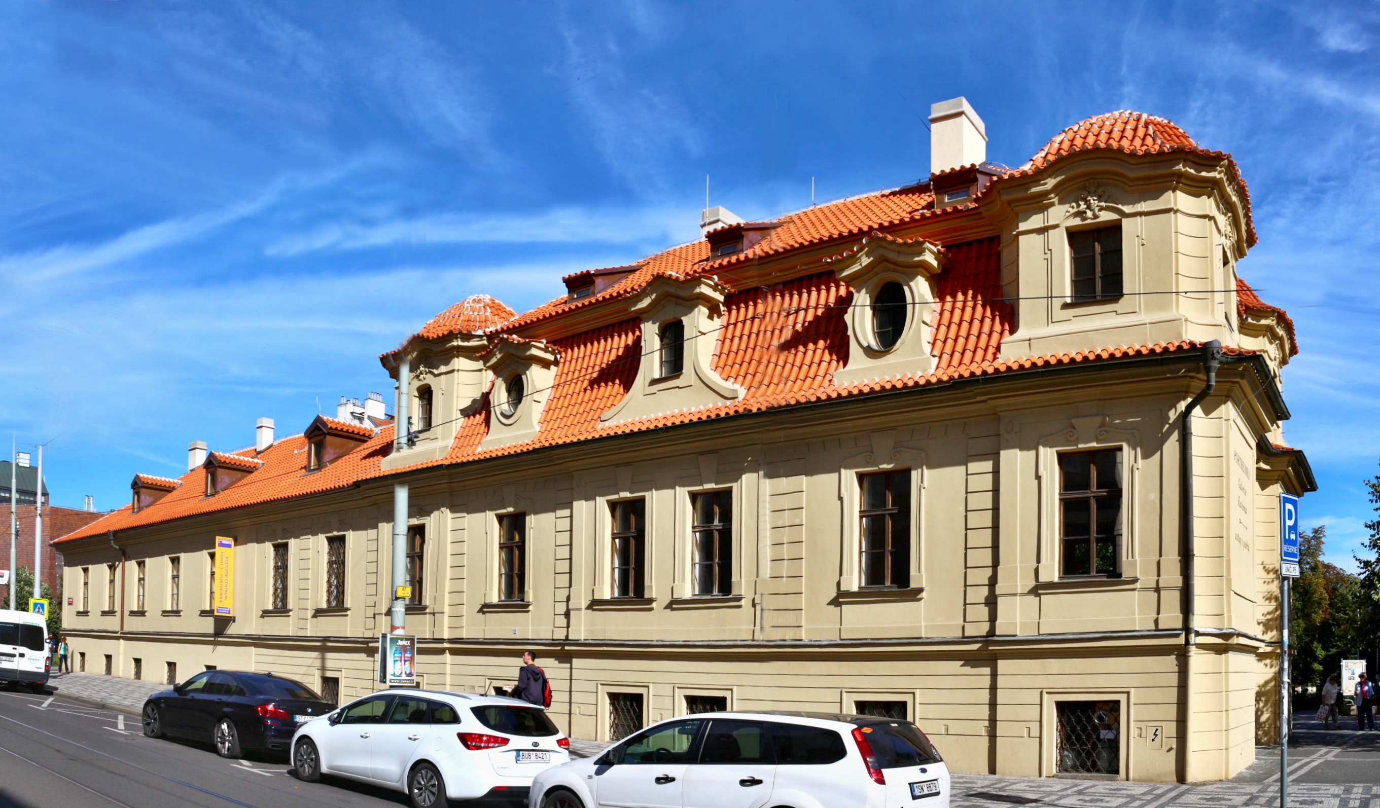 Smíchov Portheimka